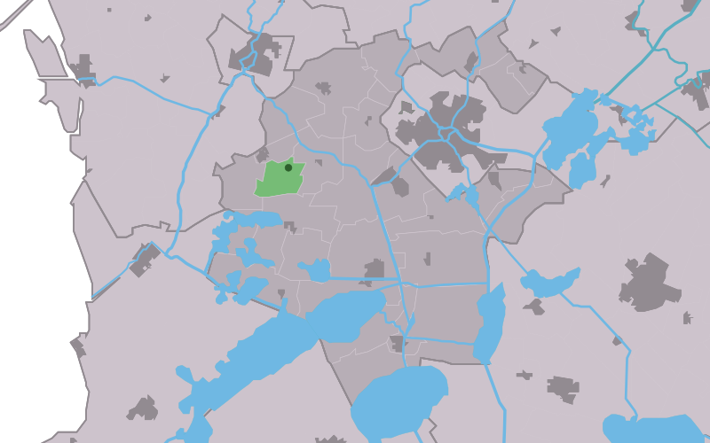 Kaartsje fan himrik fan Westhim